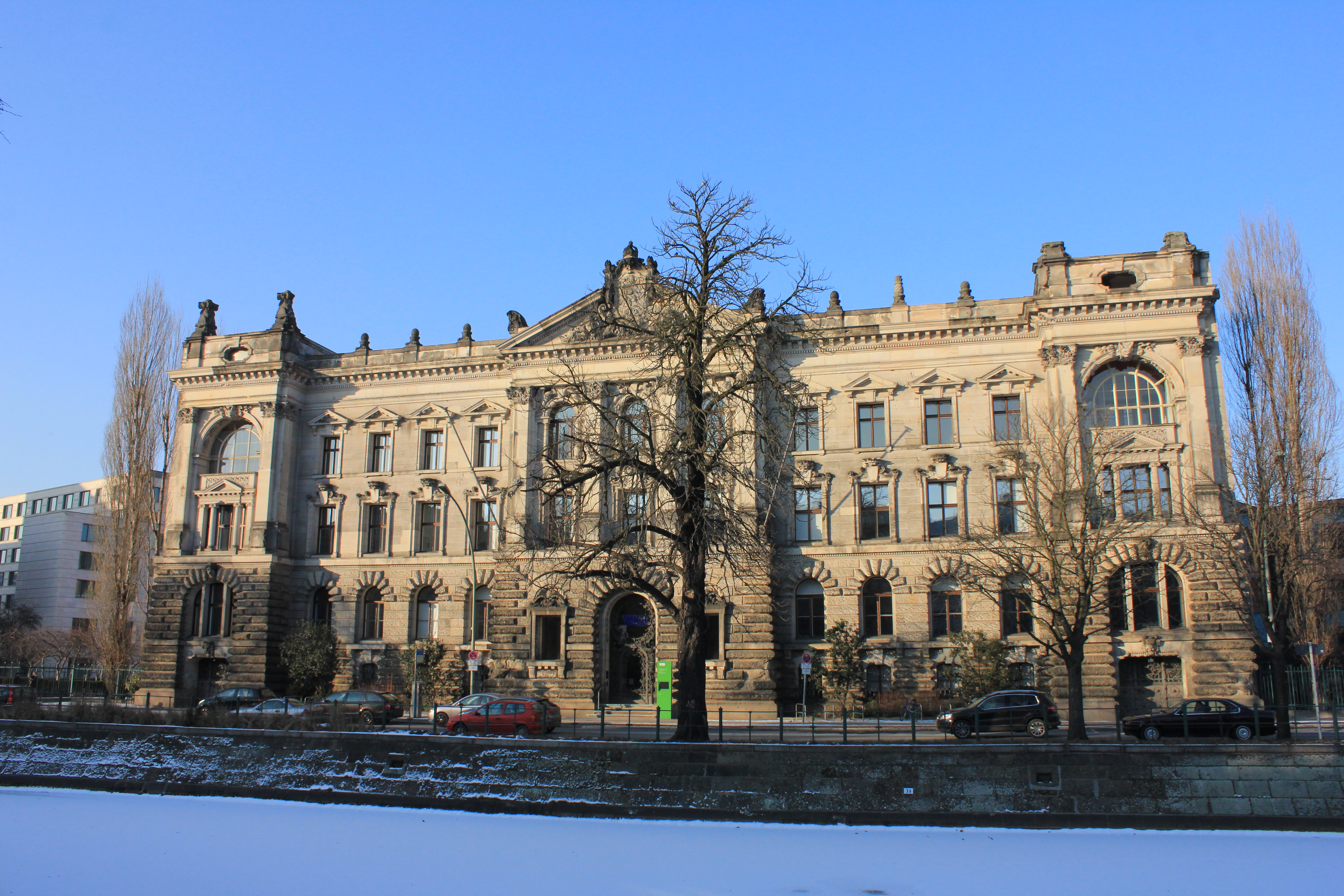 Reichsversicherungsamt 1891-94 von August Busse